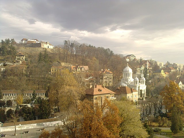 Dealul Cetăţii şi Str. Nicolae Iorga, Braşov